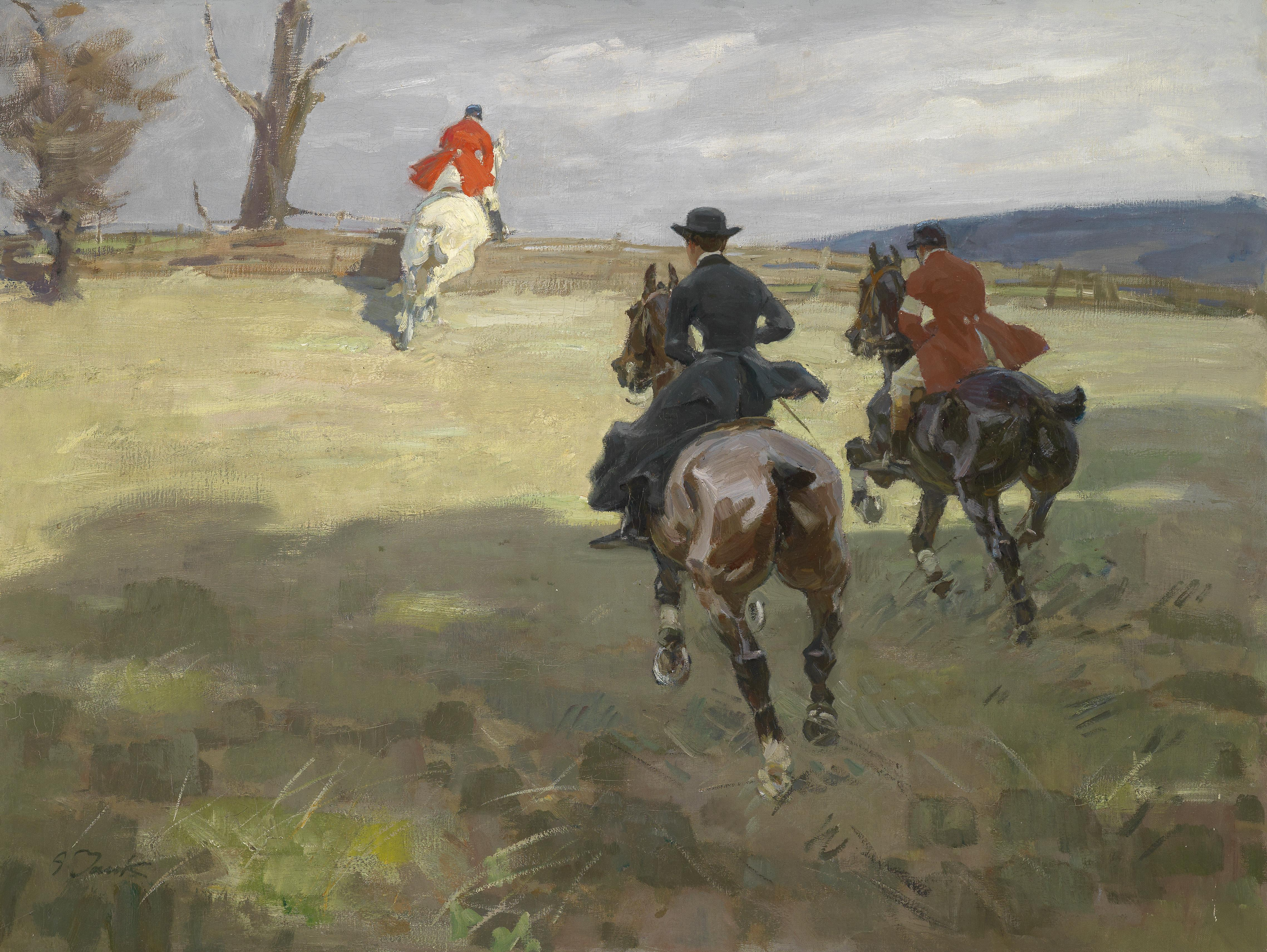 Parforcejagd